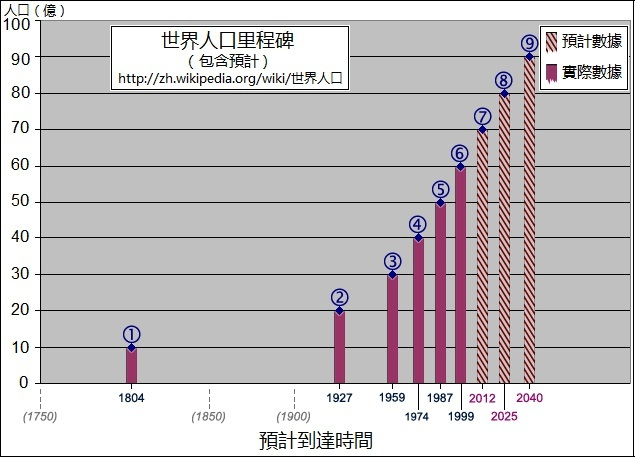 中文（中国大陆）: 世界人口里程碑，繁體版